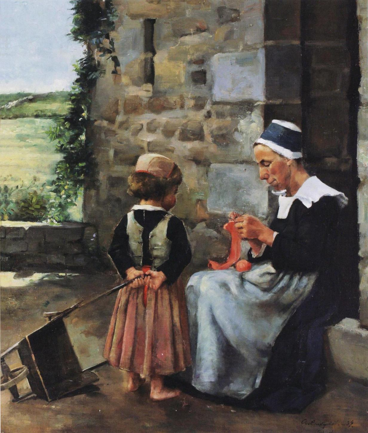 Agda Lindqvistin maalaus, kuuluu yksityiskokoelmaan.